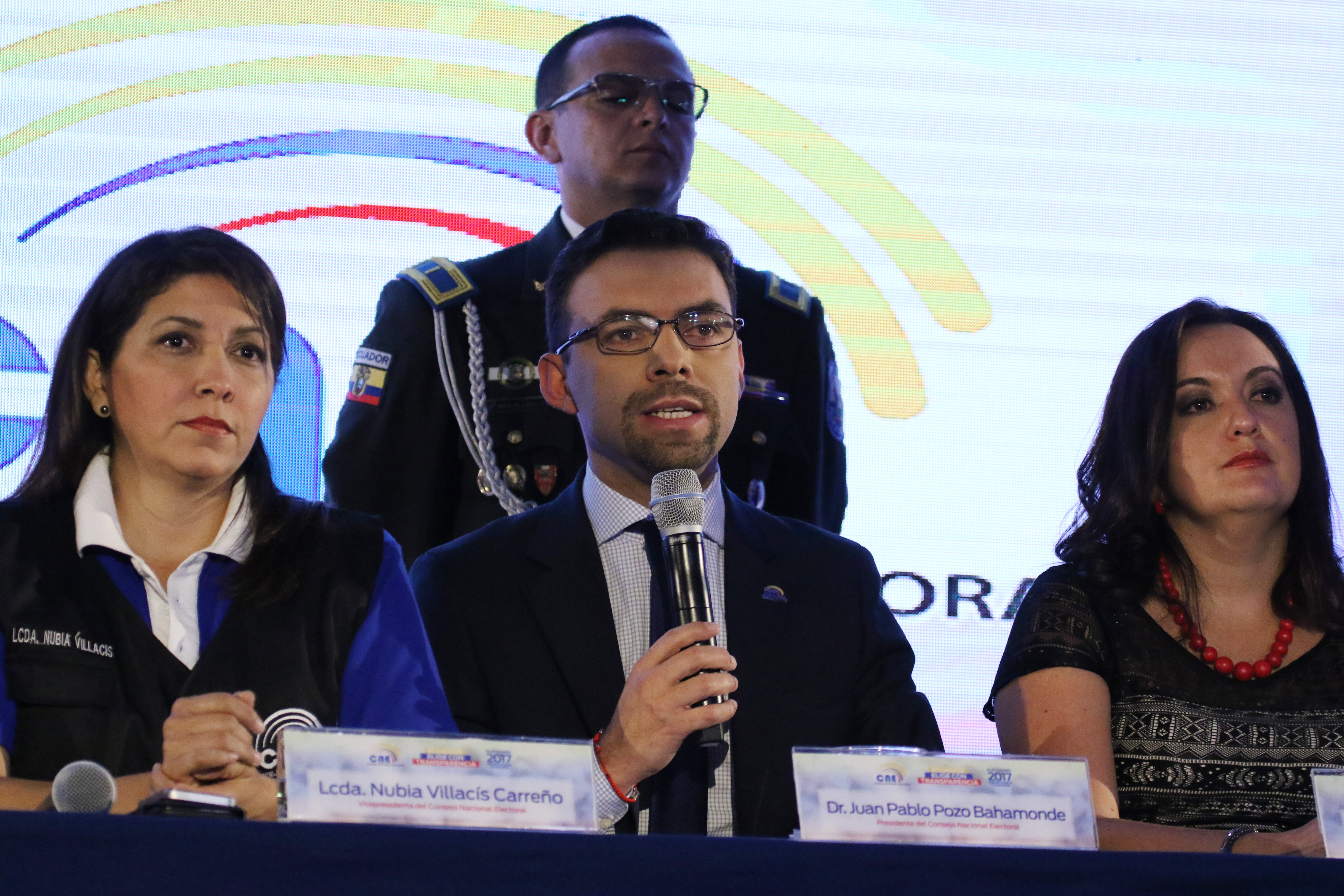 Quito, 02 de abril de 2017 (Andes).- El presidente del Consejo Nacional Electoral de Ecuador (CNE), Juan Pablo Pozo, felicitó este domingo a los ecuatorianos por “dar una jornada democrática en paz”, al presentar el tercer reporte informativo, a pocos minutos del cierre de las votaciones para elegir al binomio presidencial que gobernará el país de 2017 a 2021. ANDES/Micaela Ayala V.